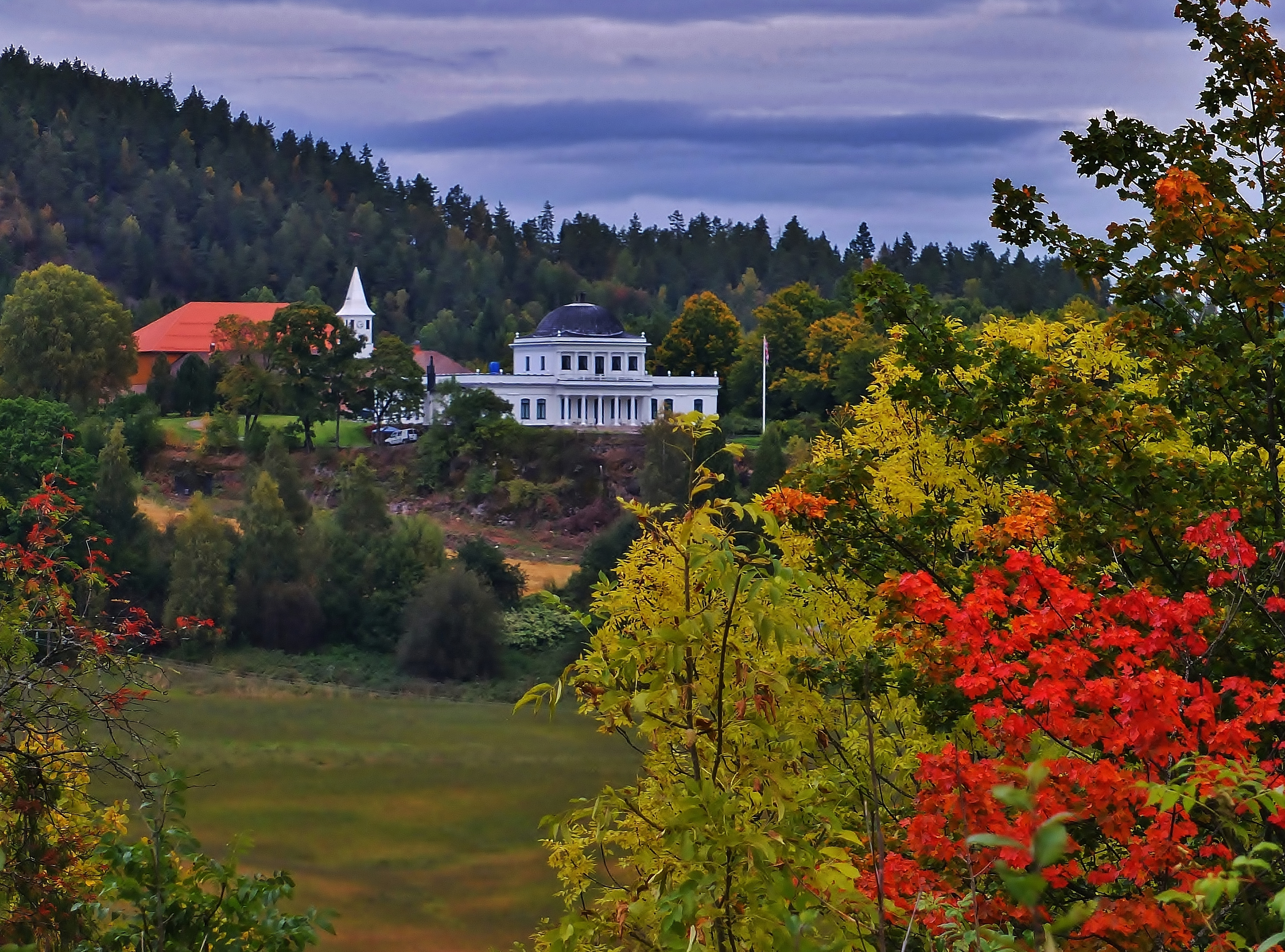 Ulefos Hovedgaard